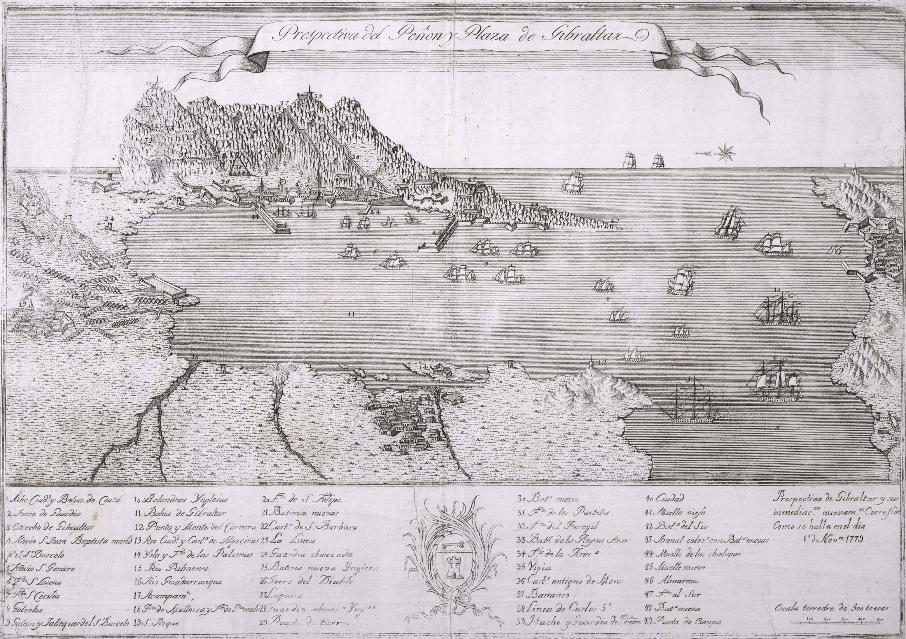 La vista representa el sitio del ejército hispano-francés a la plaza de Gibraltar, dirigido por Antonio Barceló en 1779. En el margen inferior figura la siguiente nota: "Prespectiva de Gibraltar y sus inmediacnes. nuevamte. Corregido Como se halla en el dia 1º de Novre. 1779"